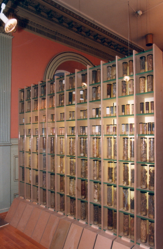 Drogesamling fra Svaneapoteket i Bergen.